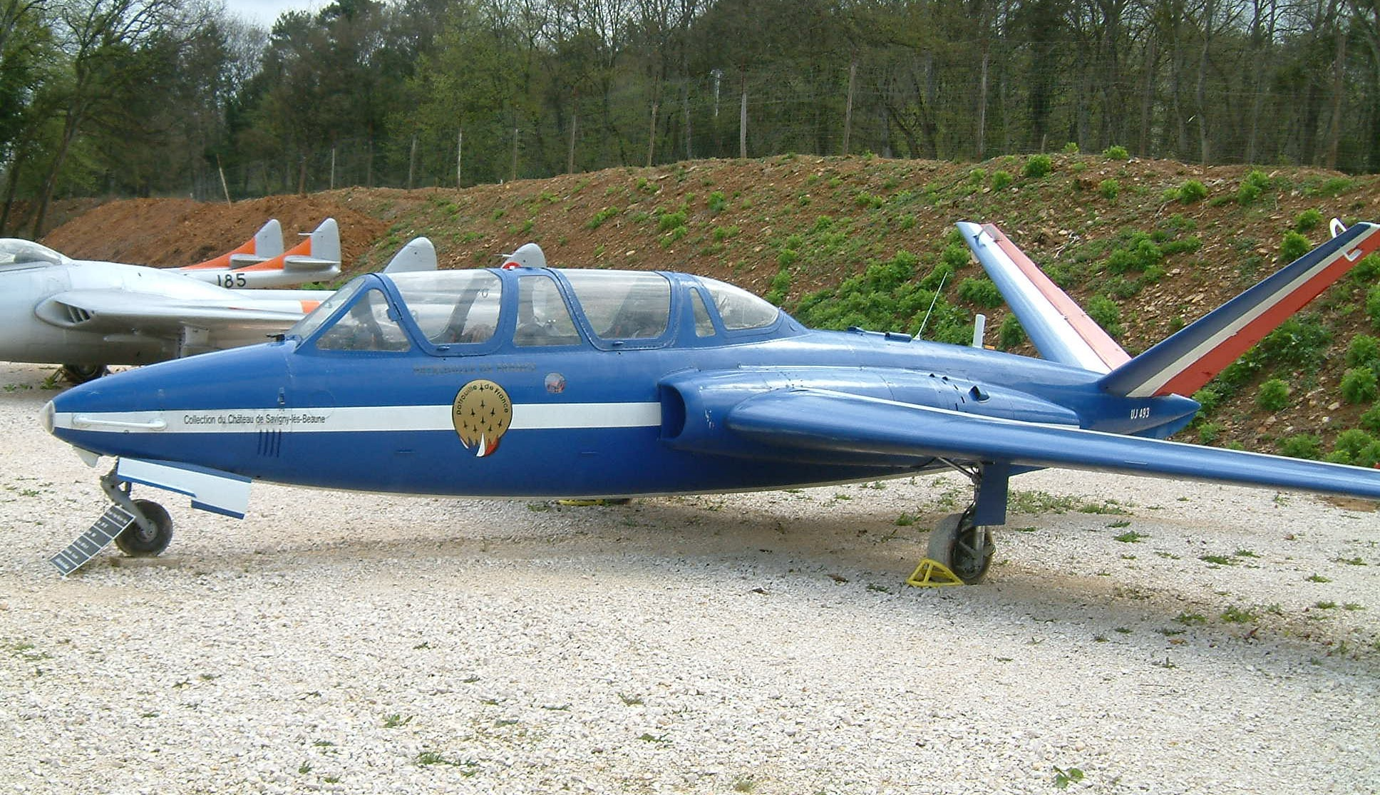 Fouga Magister conservé au musée du Château de Savigny-lès-Beaune, Bourgogne, FRANCE